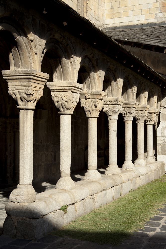 unidentified Spain